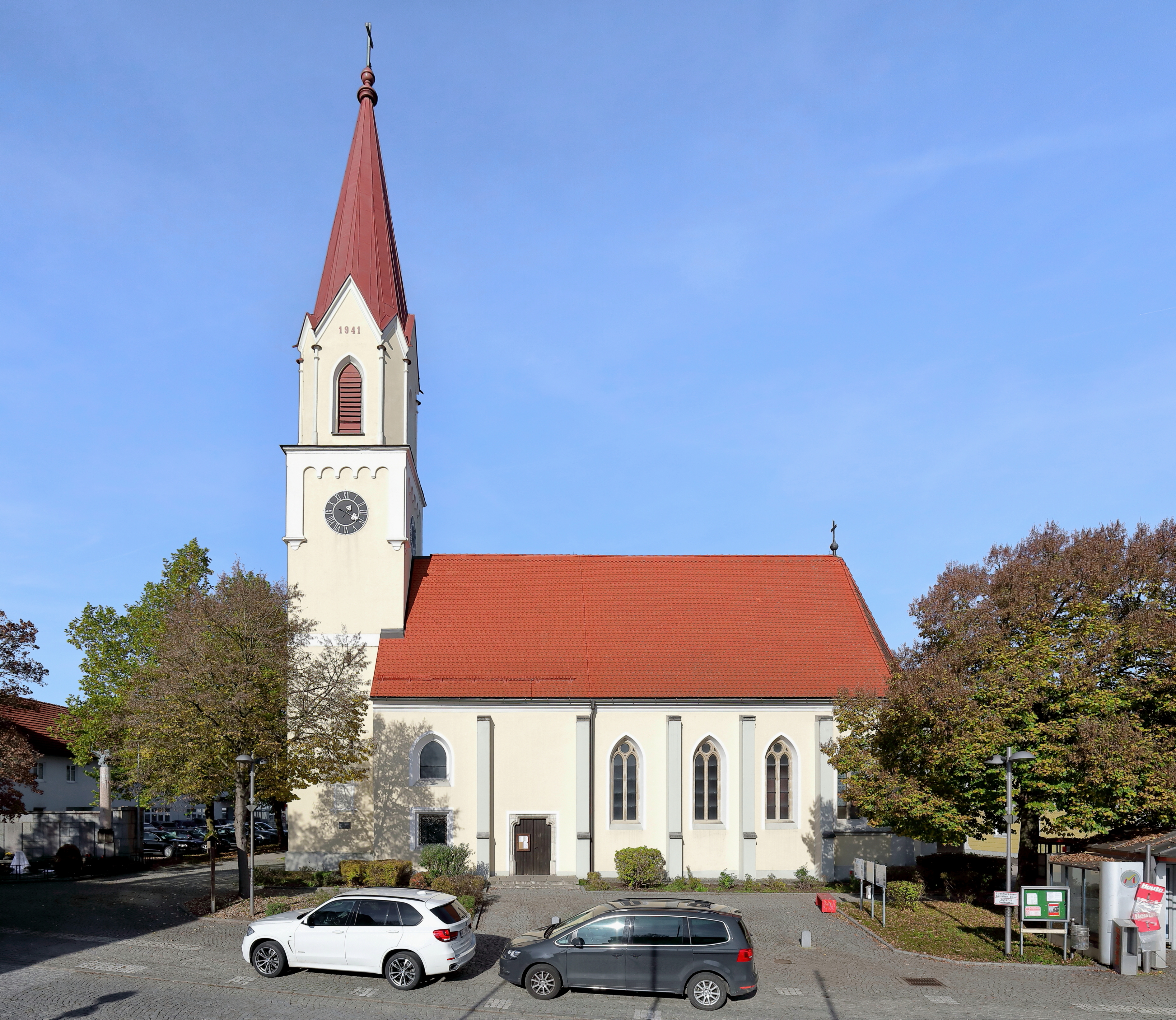 Südansicht der ehemaligen röm.-kath. Pfarrkirche hl. Stephanus und jetzige Friedhofskirche in der oberösterreichischen Stadt Marchtrenk.Eine einschiffige spätgotische Kirche aus dem Ende des 15. Jahrhunderts, die unter anderem 1881 umgebaut wurde. Nach einem Blitzschlag 1846 wird der Kirchturm wieder instandgesetzt und erhält seine heutige Form. Anfang der 1970er Jahre wird aus Platzgründen eine neue Pfarrkirche errichtet und die alte erhält den Status einer Friedhofskirche.